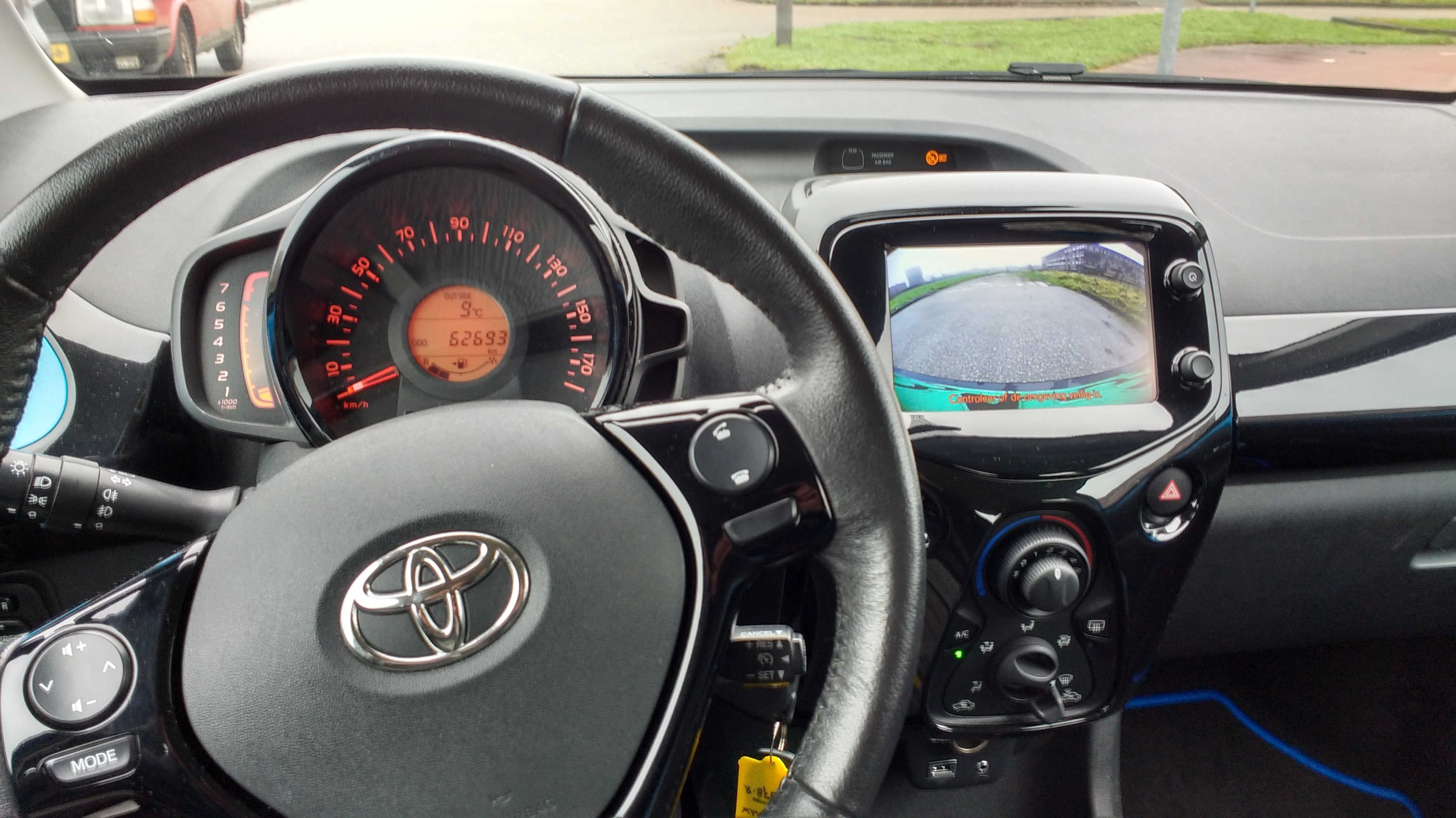 Interieur Toyota Aygo